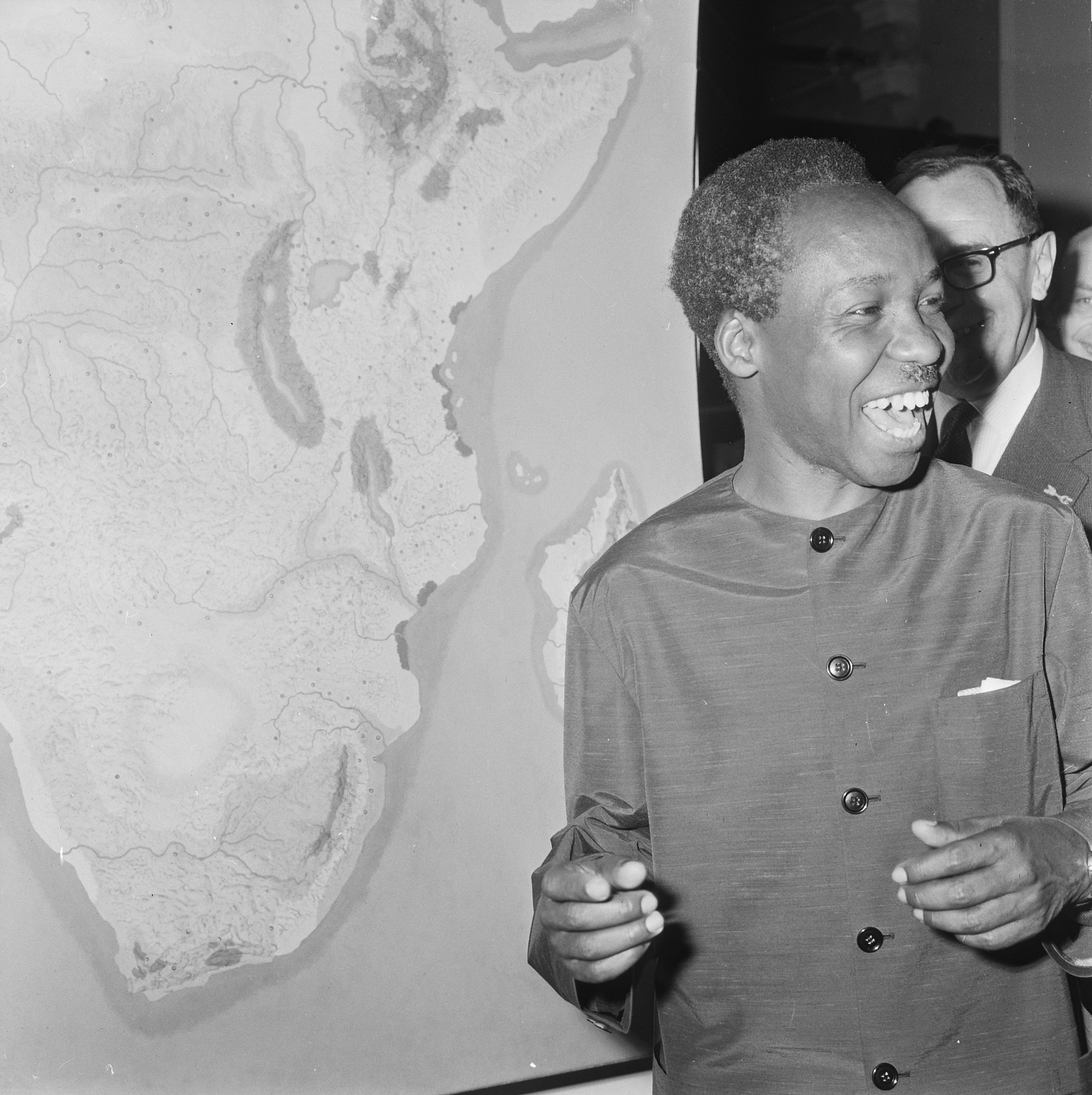 Collectie / Archief : Fotocollectie Anefo Reportage / Serie : [ onbekend ] Beschrijving : Staatsbezoek president Nyerere van Tanzania, president Nyerere bezoek gebracht aan Tropenmuseum, president Nyerere op Afrikaanse afdeling Datum : 21 april 1965 Trefwoorden : rondgangen, staatsbezoeken Persoonsnaam : Nyerere, Julius Instellingsnaam : Tropenmuseum Fotograaf : Koch, Eric / Anefo Auteursrechthebbende : Nationaal Archief Materiaalsoort : Negatief (zwart/wit) Nummer archiefinventaris : bekijk toegang 2.24.01.03 Bestanddeelnummer : 917-6721